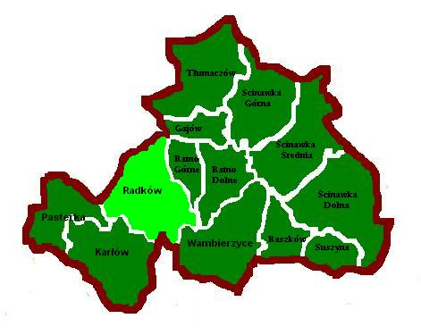 Gmina Radków - podział administracyjny